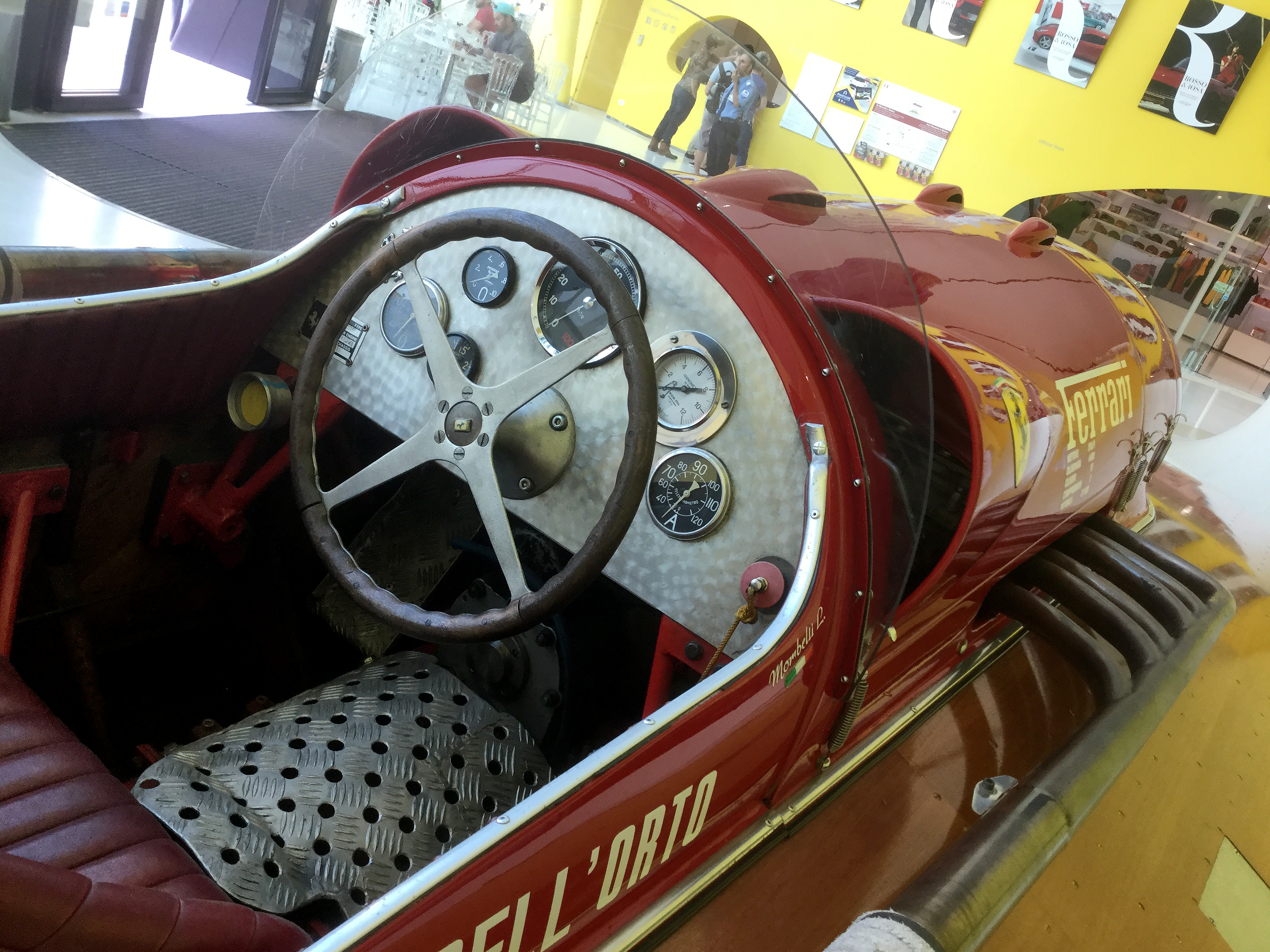 Ferrari Arno XI im Ferrari Museum Modena